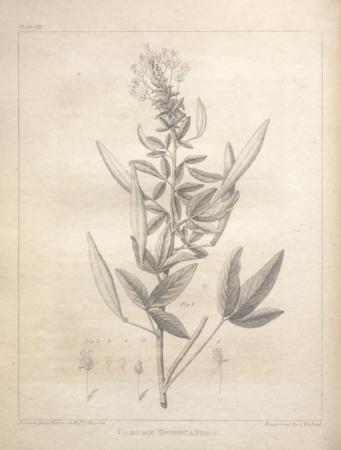 • J I i . 3 '--' " f . //',//■/,"/ J;n ,/r ,.■/■;/ fiv /'..Tii